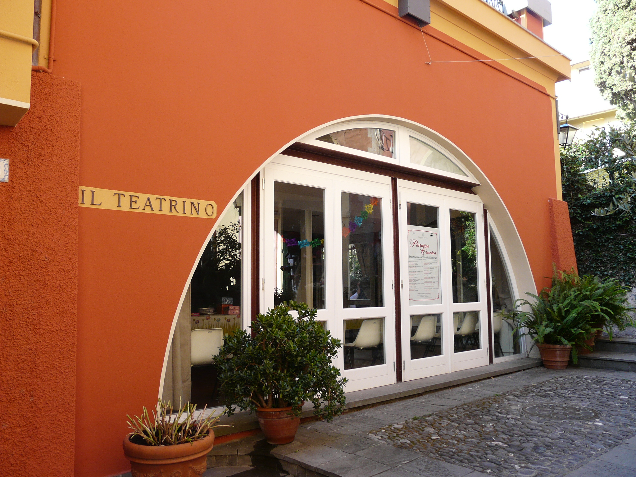 Il Teatrino di Portofino, Liguria, Italia